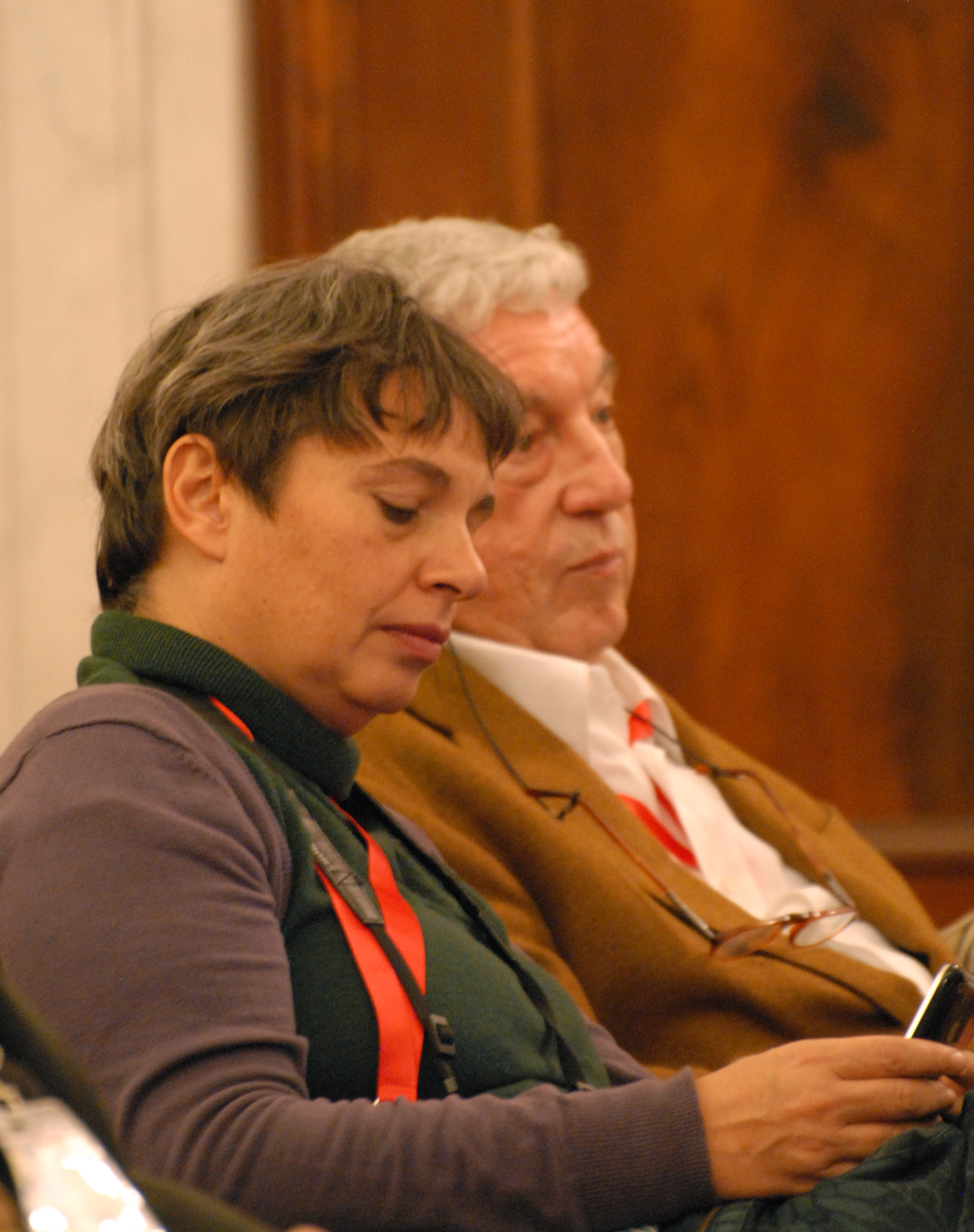 Laura Scarpa e Sergio Bonelli Photo taken during Lucca Comics&Games 2010